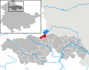 Badra in Thuringia - Kyffhäuserkreis